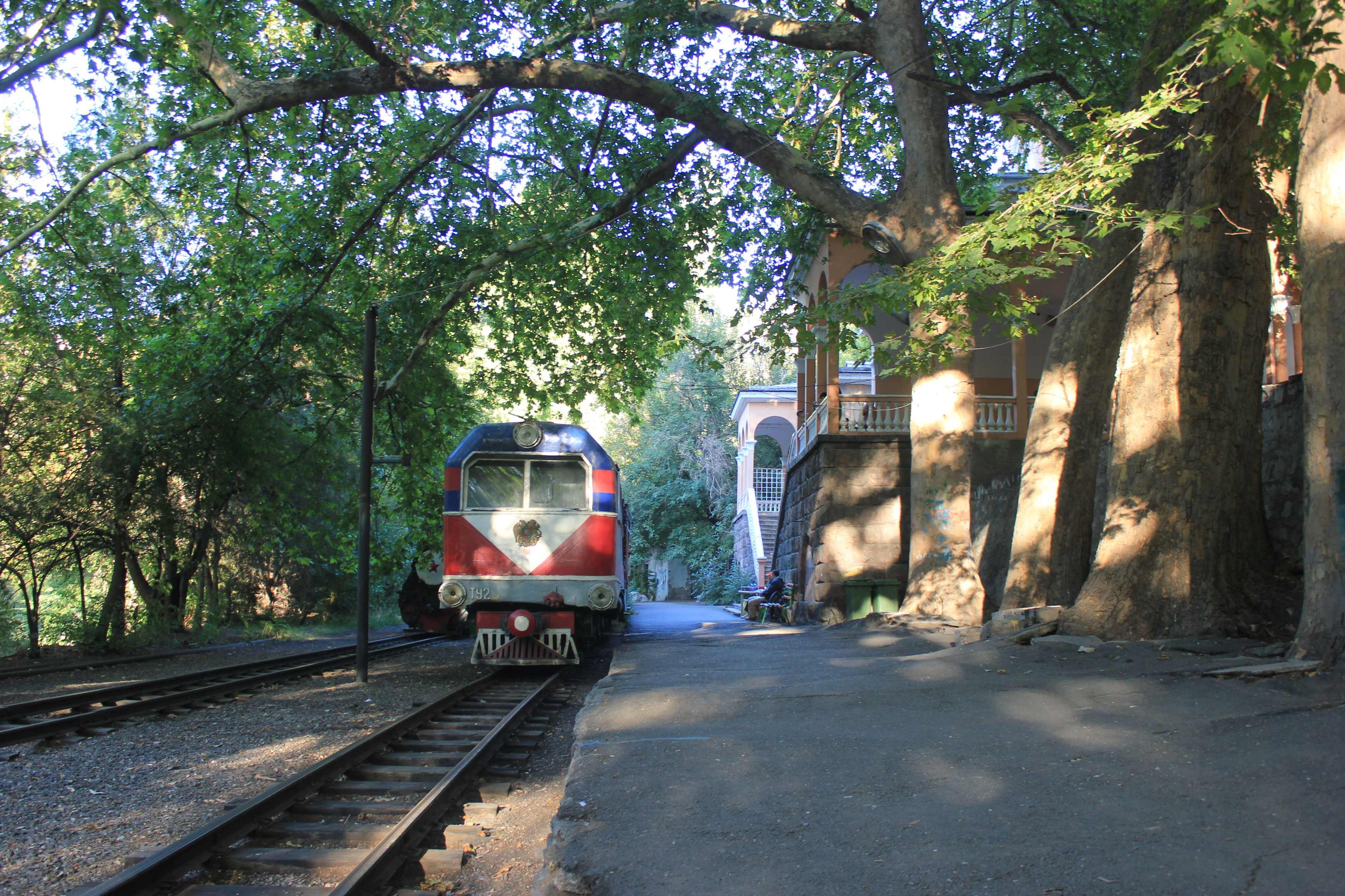 Bahnhof der Kindereisenbahn Jerewan.